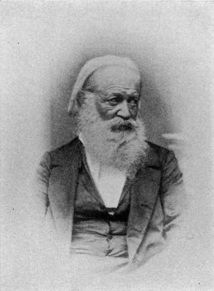 Hans Ferdinand Maßmann (1797—1874), German philologist